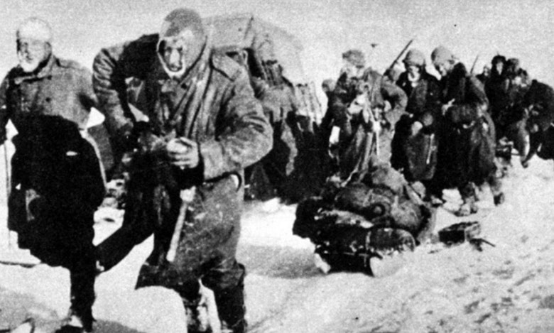 Le disastrose condizioni con le quali dovettero fare i conti le truppe in ritirata dal Don